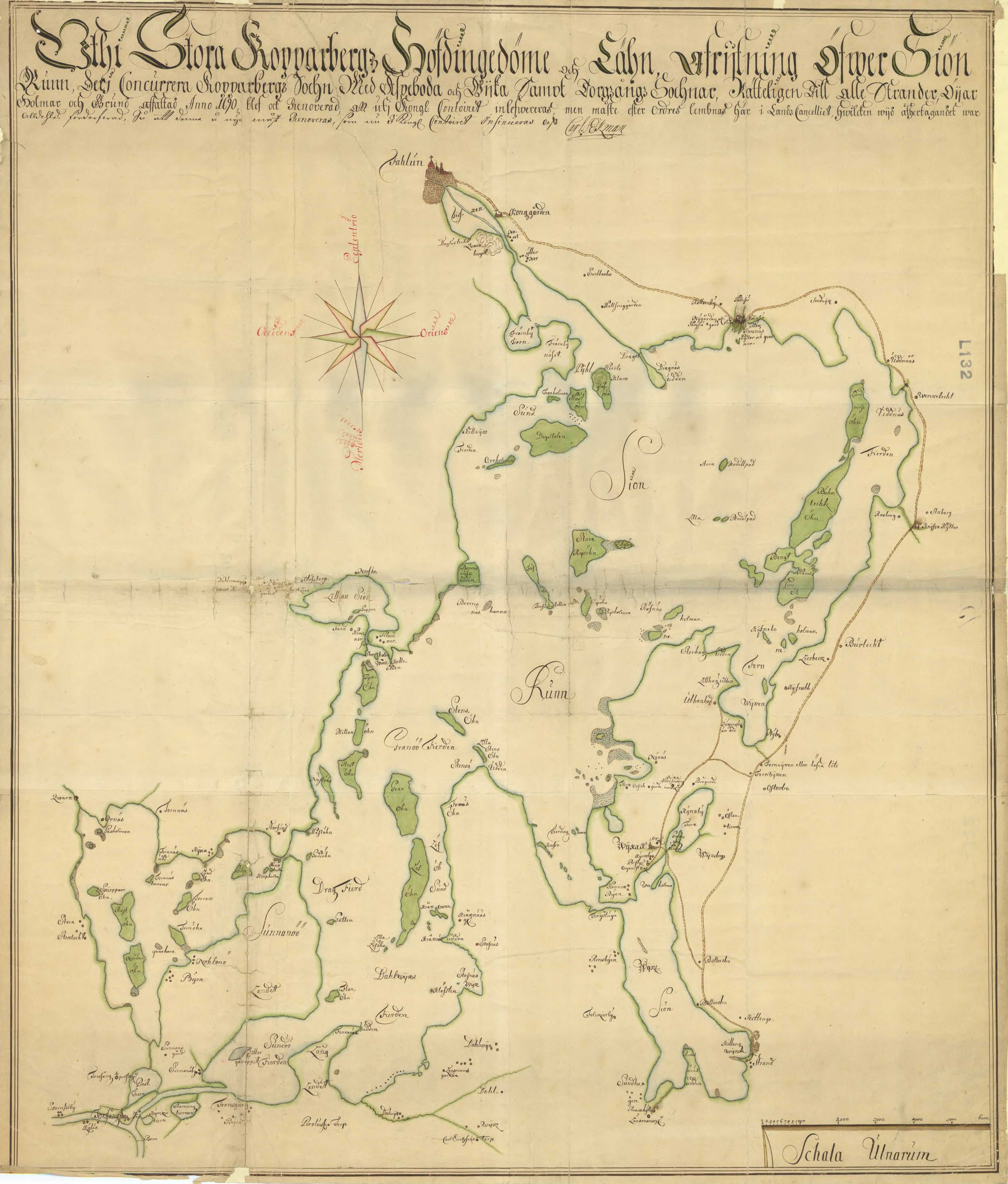 Äldre karta över sjön Runn i Dalarna.